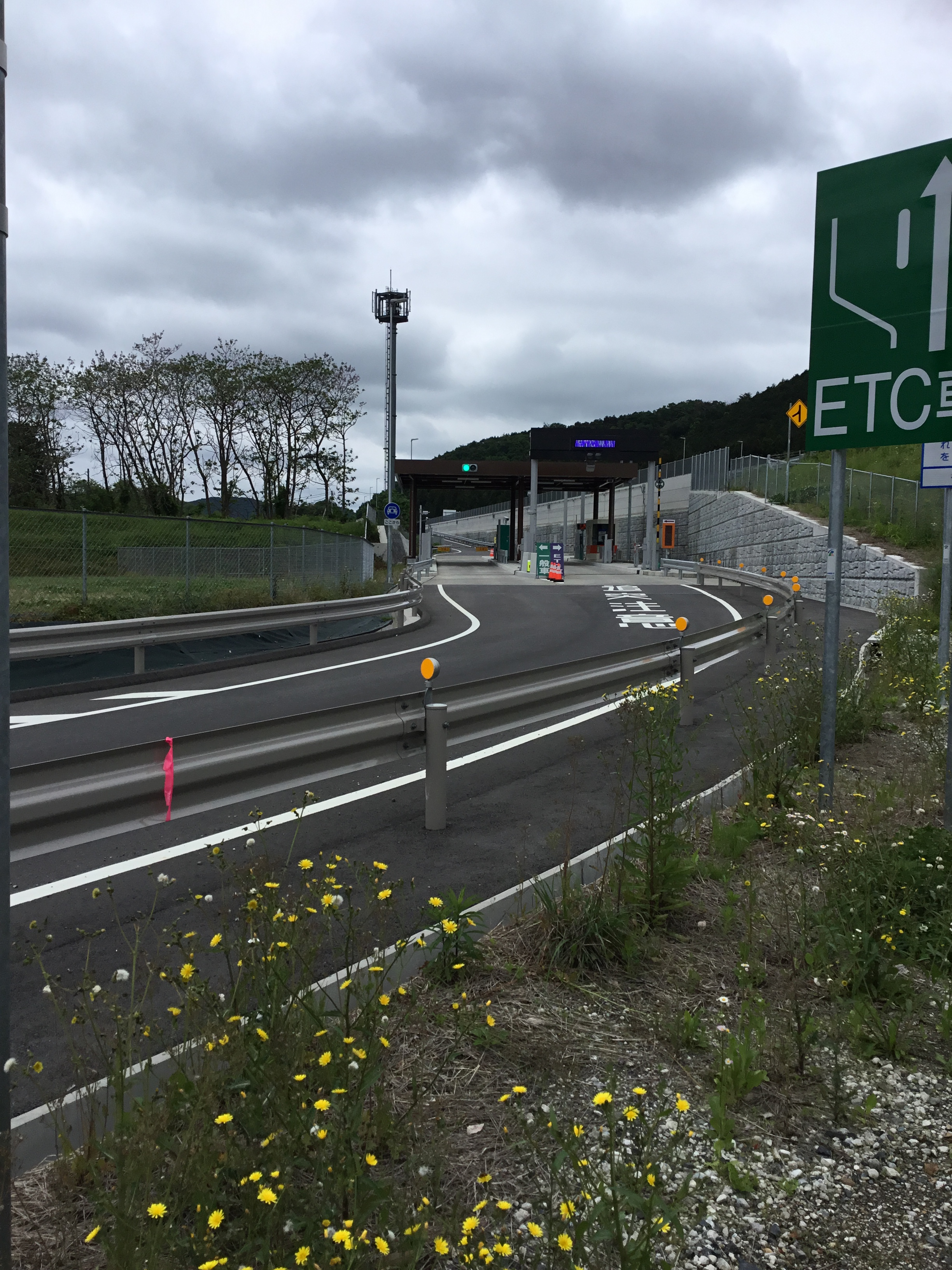 篠井インターチェンジ